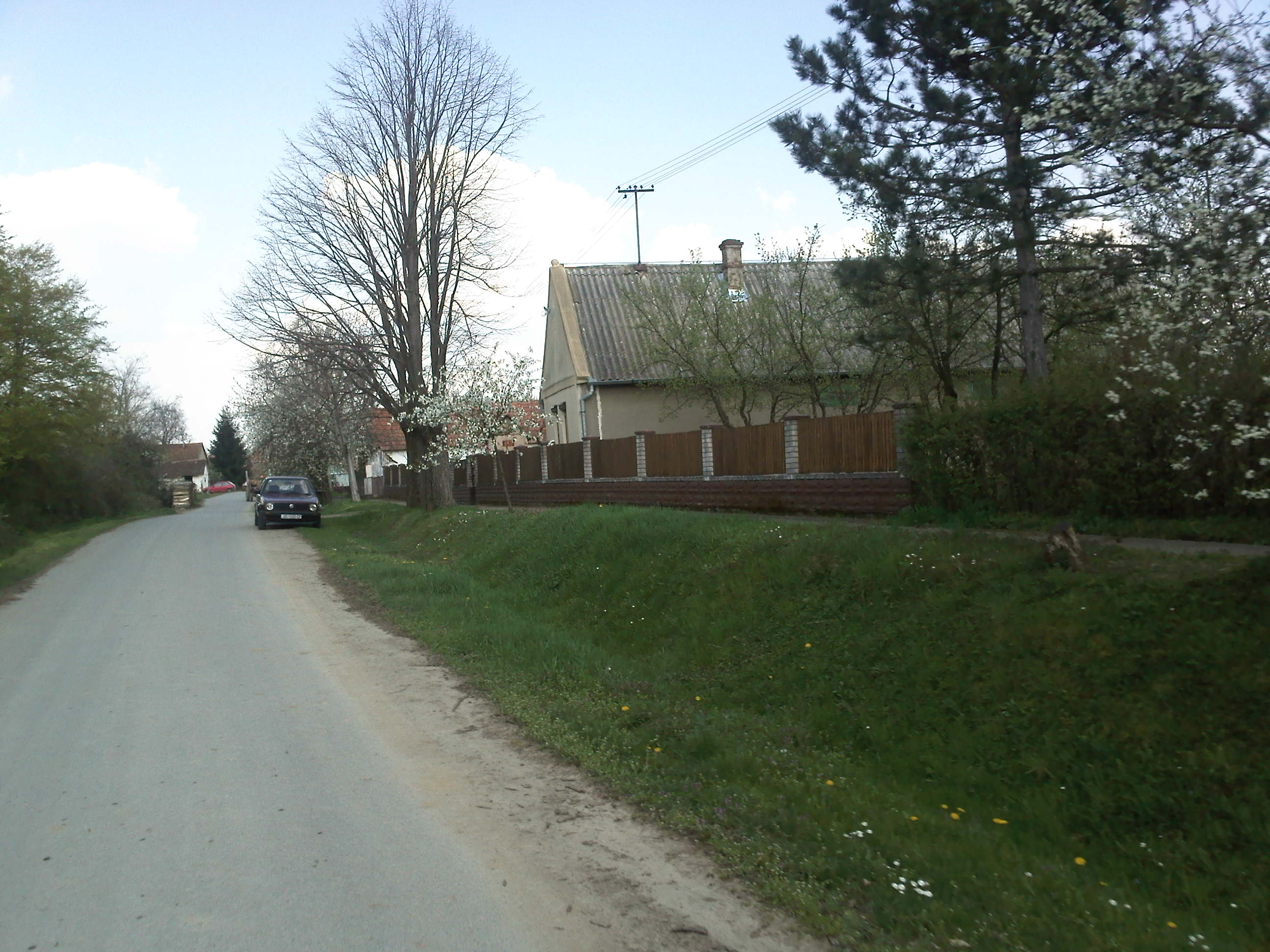 Kršinci